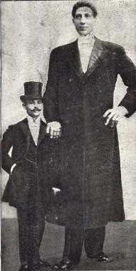 Махнов